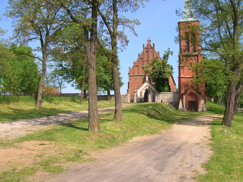 Pszczonów - kościół parafialny pw. Wszystkich Świętych (zabytek nr 261/893 z 29.12.1967)